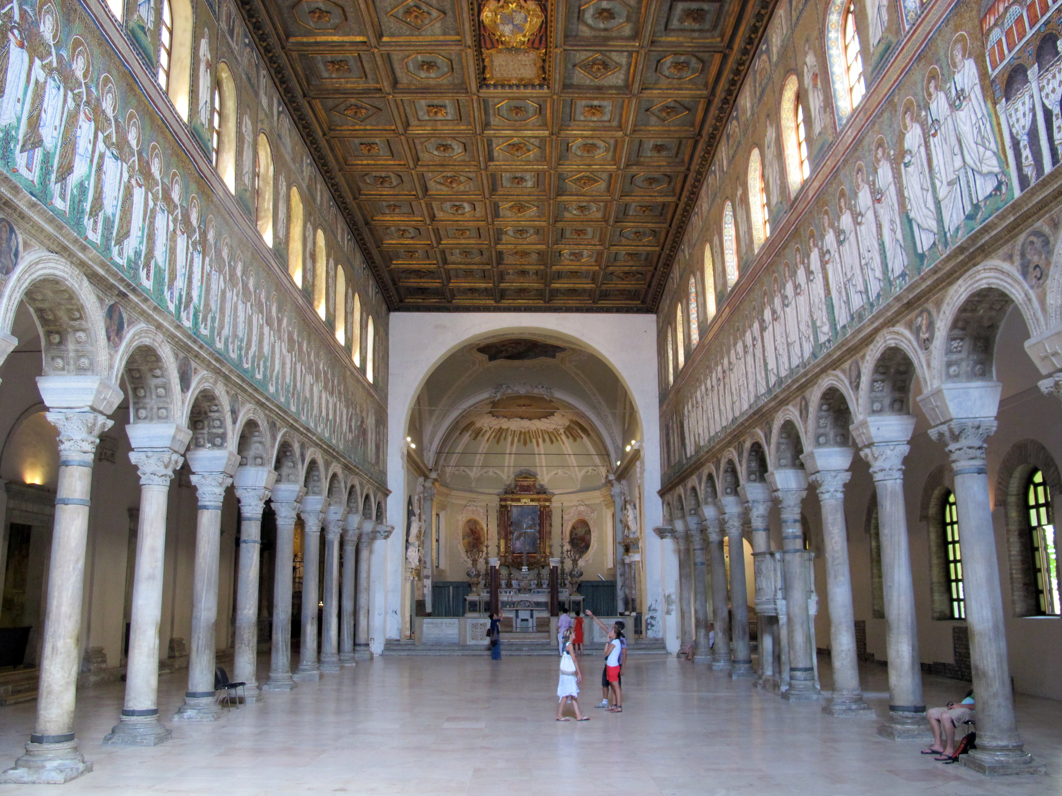 Basilica di Sant'Apollinare Nuovo - MIBAC This is a photo of a monument which is part of cultural heritage of Italy.